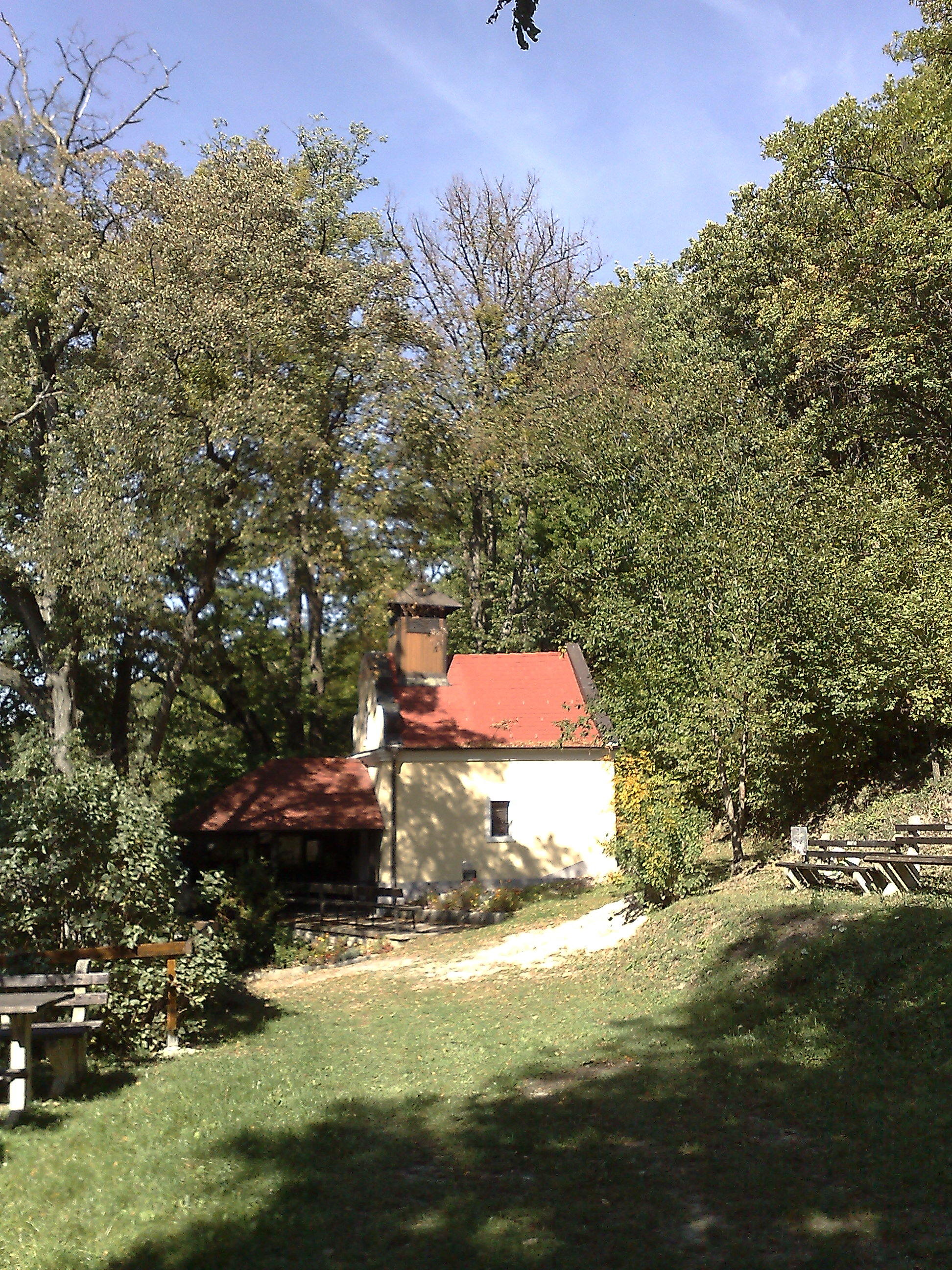 Die Maria-Bründl-Kapelle in Schwarzenbach (Niederösterreich) am Burgberg (Rosaliengebirge).